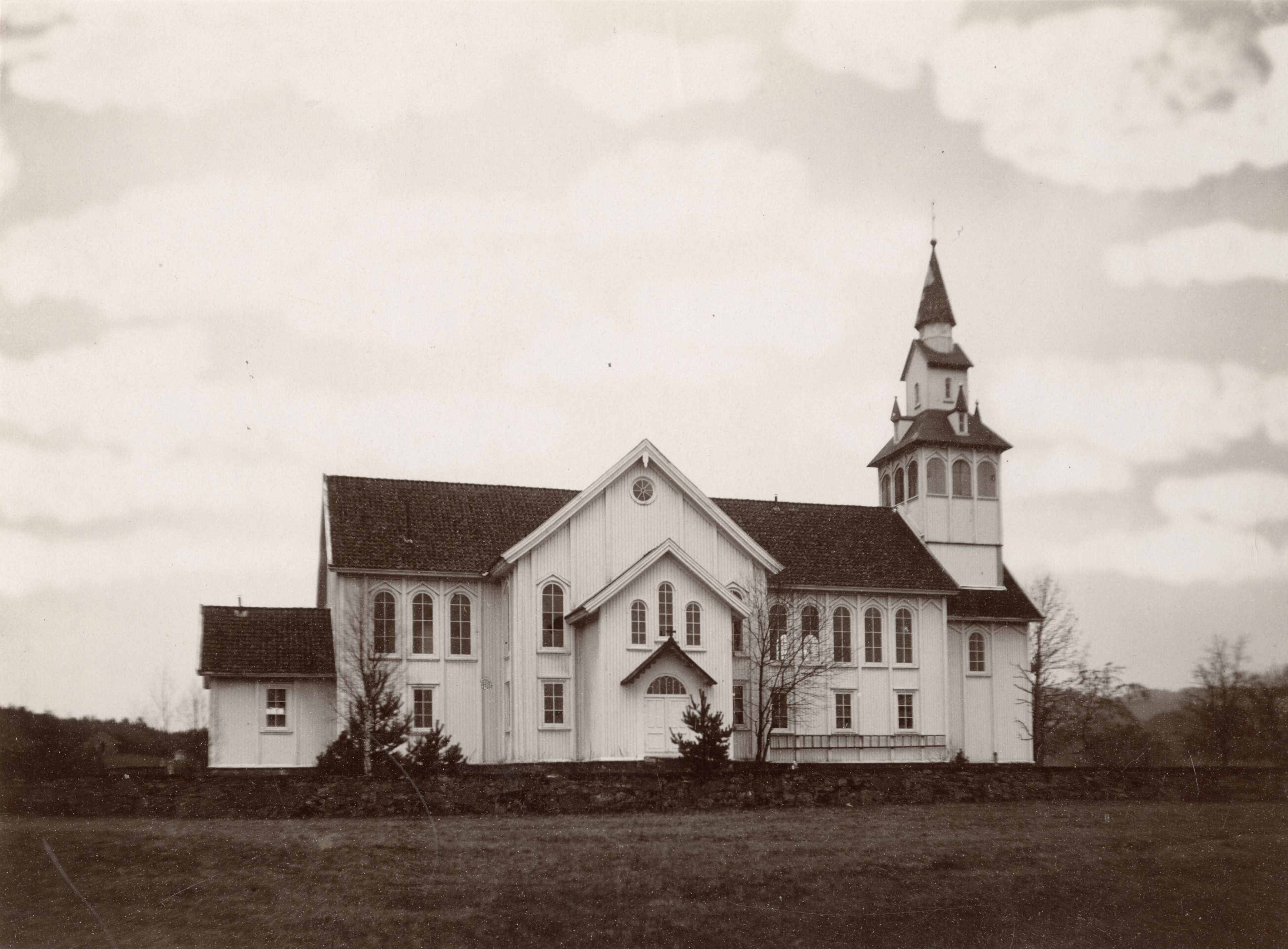 Birkenes kirke i Birkenes, Aust-Agder Ark. Grosch 1858.